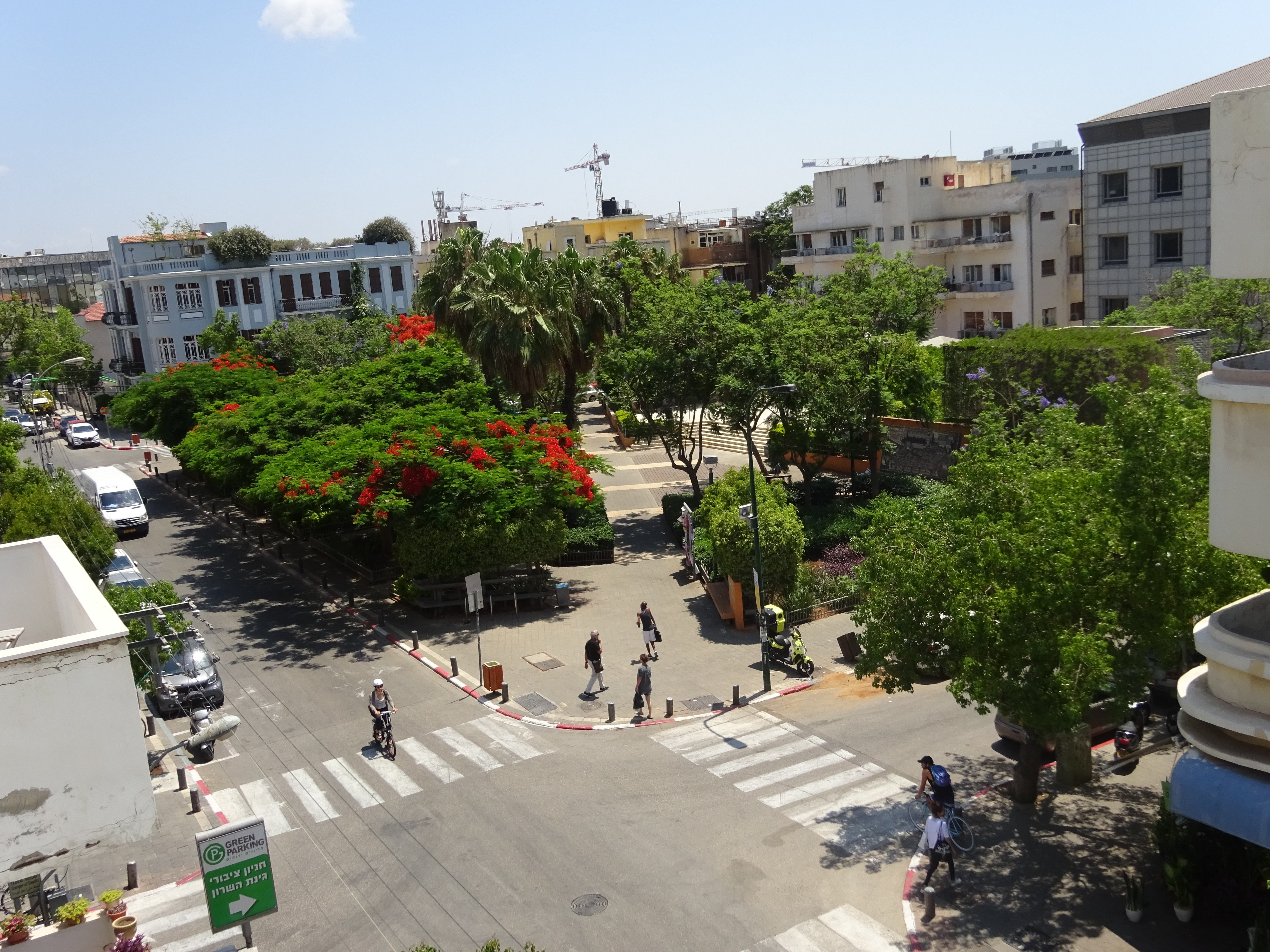 מבט "מעוף ציפור" מצפון מזרח